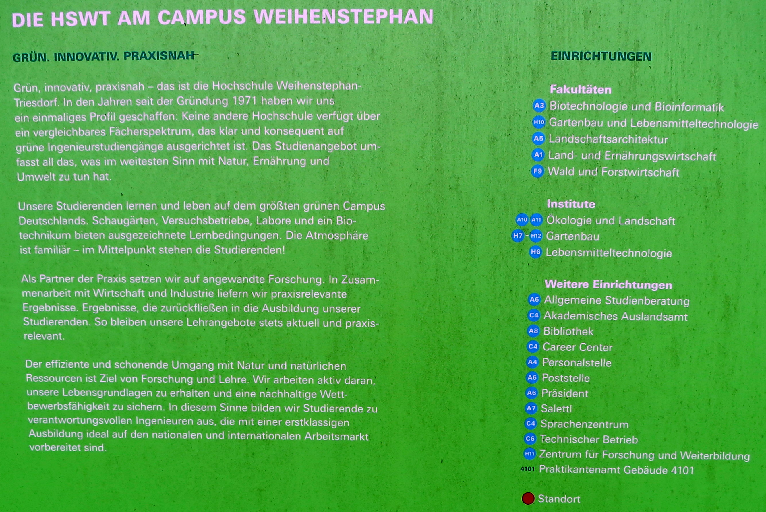 Erläuterung zum Übersichtsplan